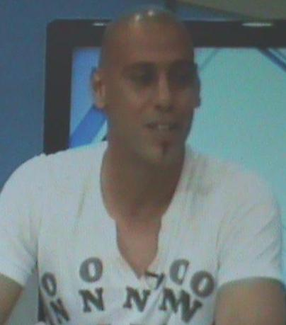 El mediocampista uruguayo Julio Mozzo en 2012.